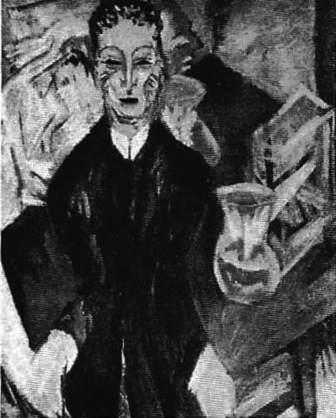 Bildnis Dr. Kohnstamm von Ernst Ludwig Kirchner, 1916 - Anmerkung: Auch Dr. Eva Kohnstamm, geb. Gad kann damit gemeint sein